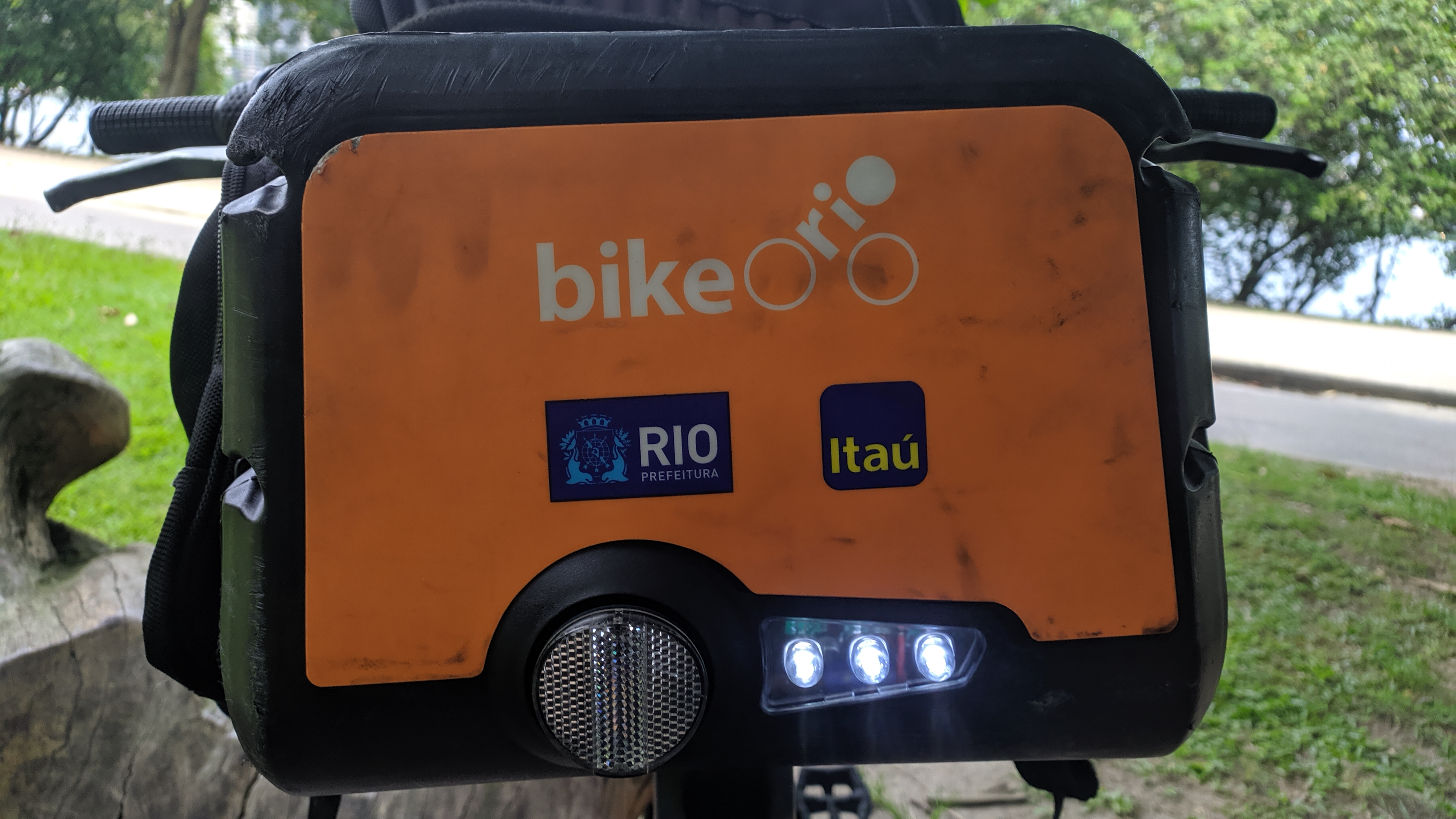 Cesta da bicicleta do Bike Itaú